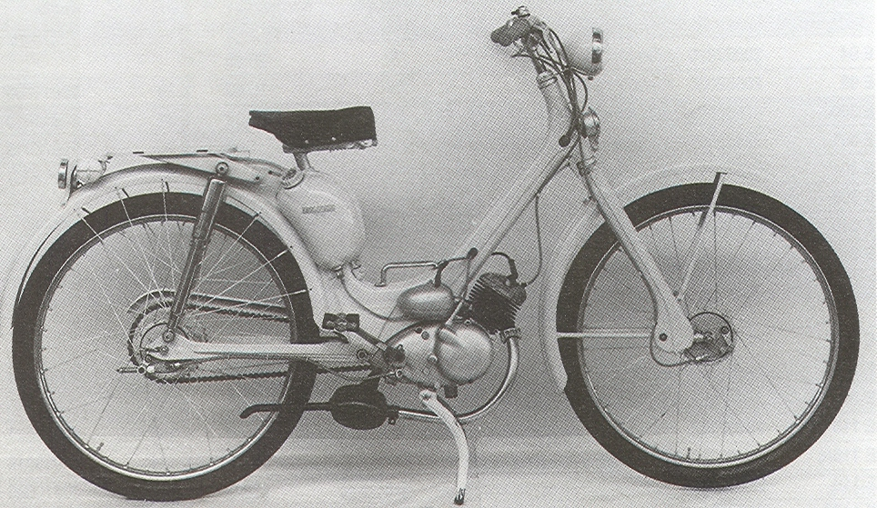 Es una foto de la moto Siambretta 48.